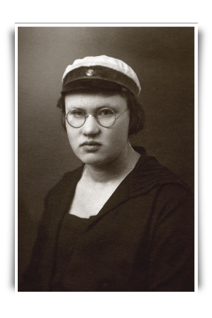 Eesti raamatukoguteadlane, bibliograaf ja õppejõud